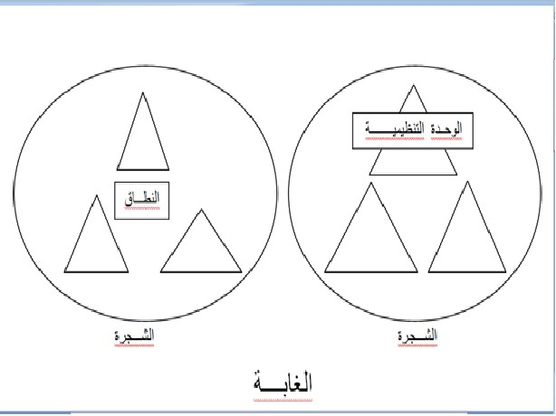 مخطط الدليل النشط